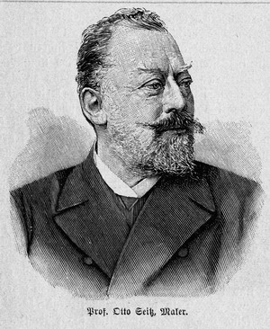 German painter Otto Seitz (1846-1912)